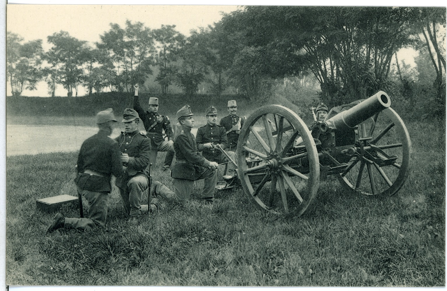 Theresienstadt; Schießen mit der neuen Feldhaubitze aus gedeckter Stellung This postcard is from publisher Brück & Sohn in Meißen ( postcard has a unique number 11538 and is available in a higher resolution at the publisher. This images was uploaded in a cooperation project between Wikipedians and the publisher.